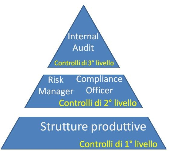 I 3 livelli del sistema dei controlli in banca come indicato da Banca d’Italia, Istruzioni di vigilanza per le banche riepilogo aggiornamenti